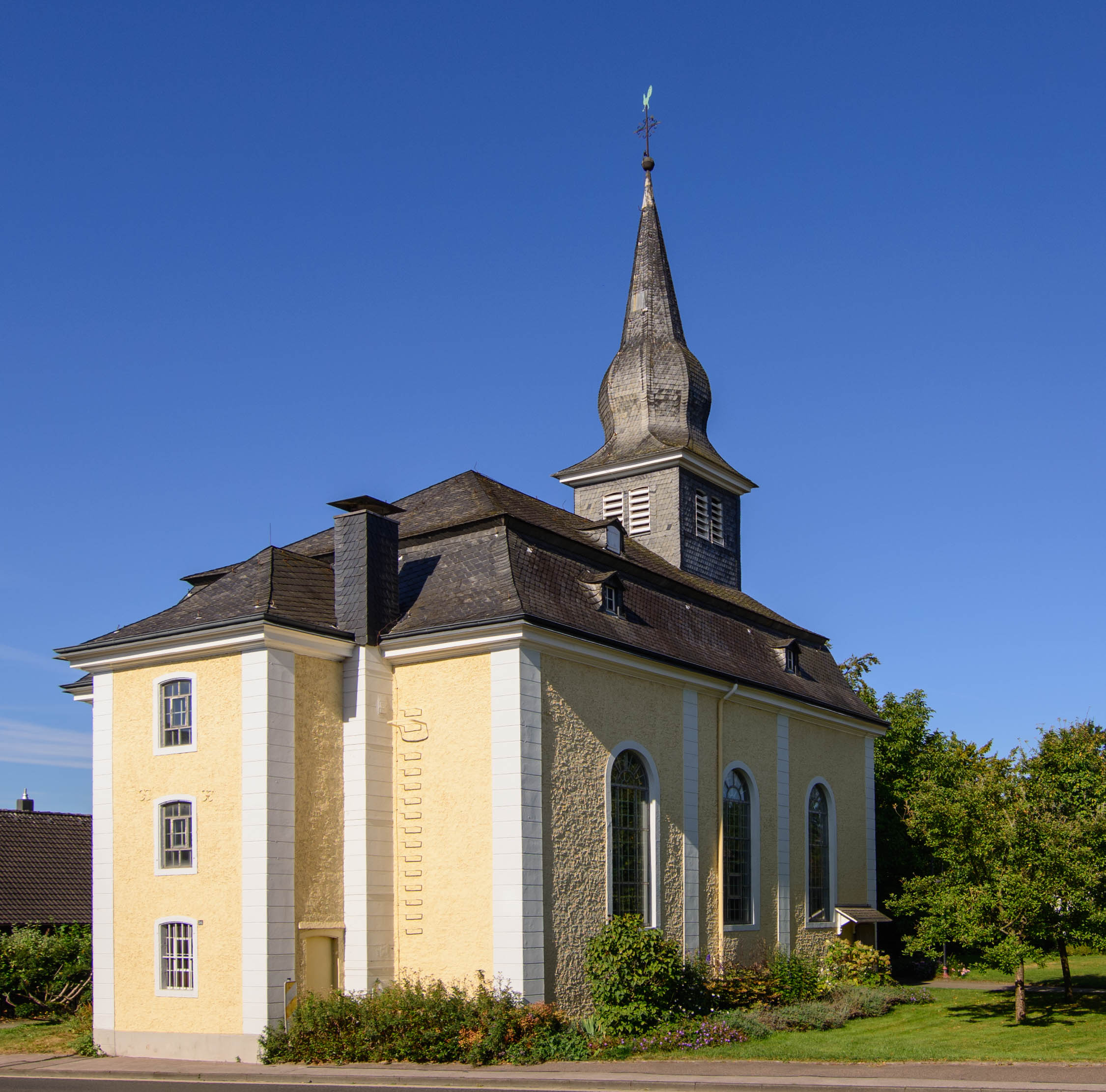 Martin-Luther-Kirche, Reusrath, Langenfeld (Rheinland) This is a photograph of an architectural monument. 009